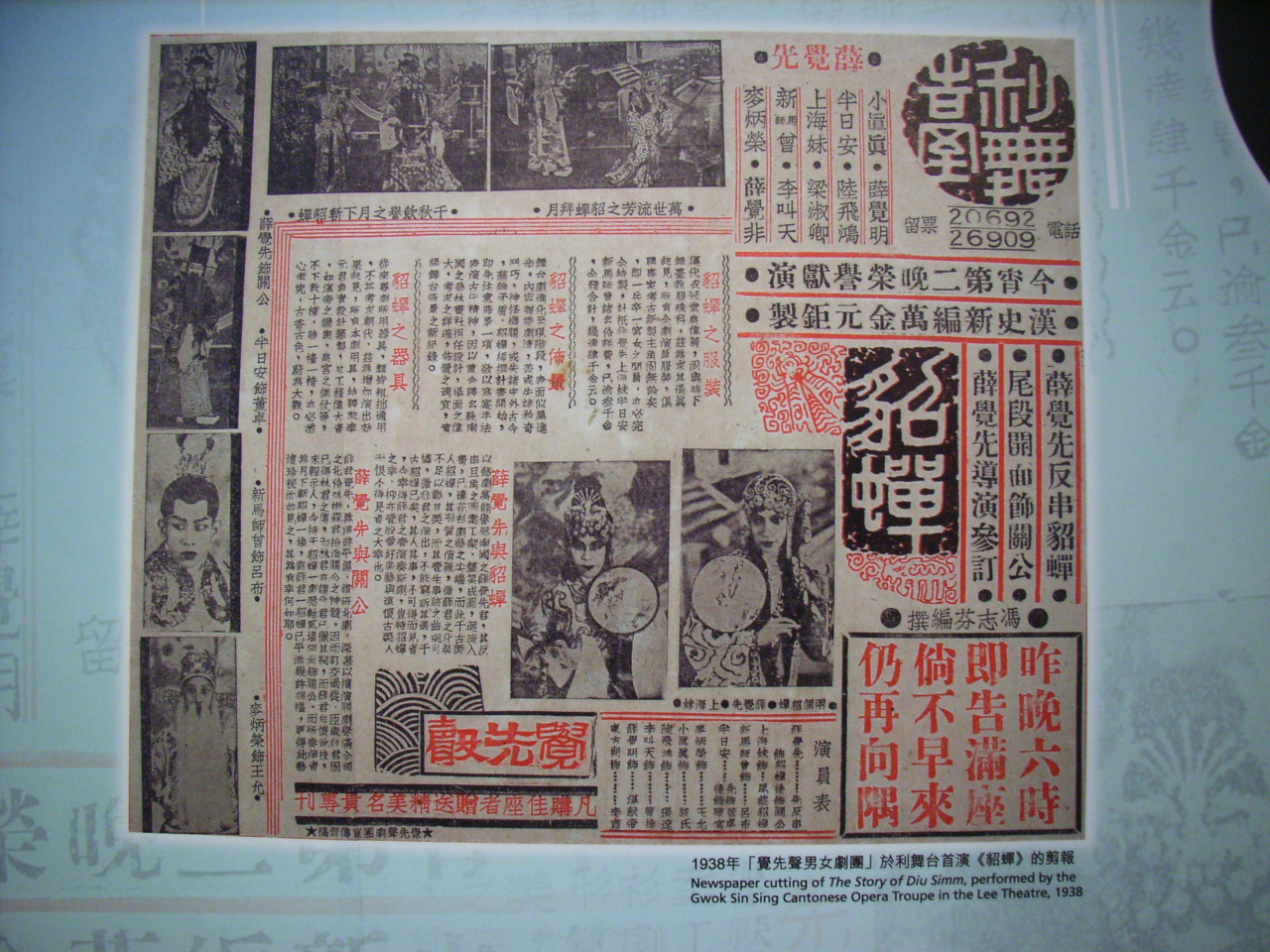 香港戲曲歷史文物展 2006年2月28日至6月30日